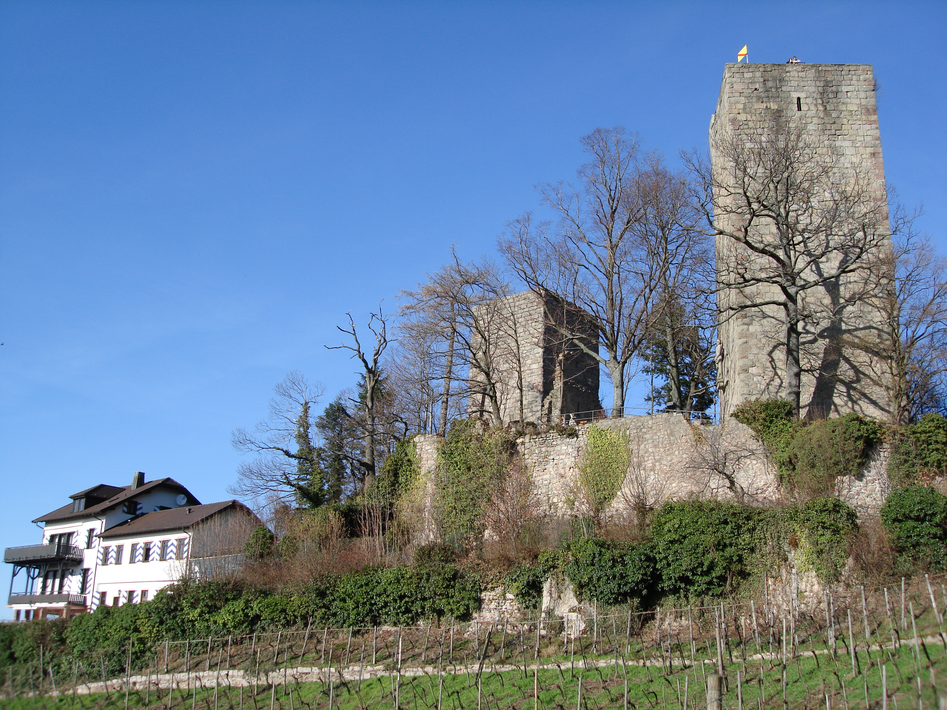 Burg Alt-Windeck (Bühl), unterhalb liegt die ehemalige Vorburg, Schloss Rittersbach (nicht im Bild)